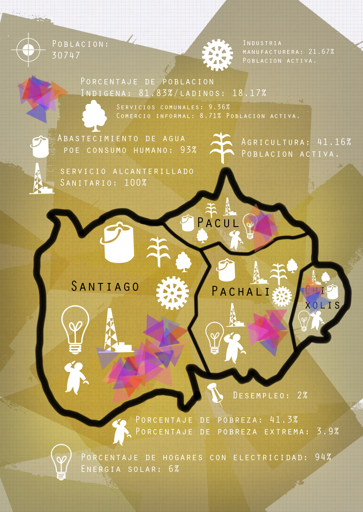 Descripcion de caracteristicas